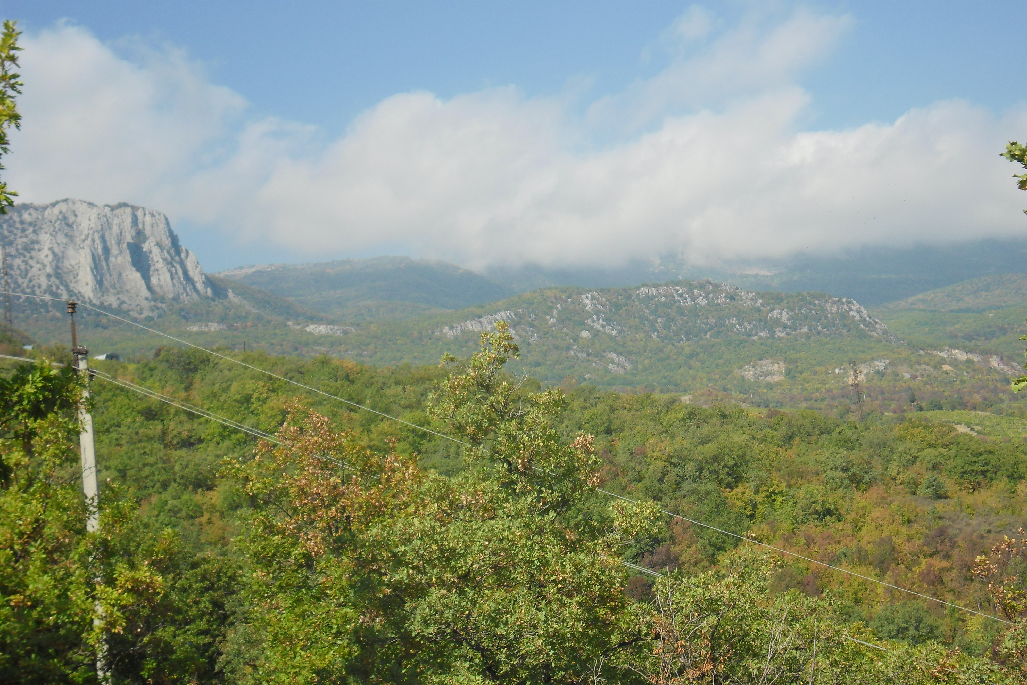 Фото